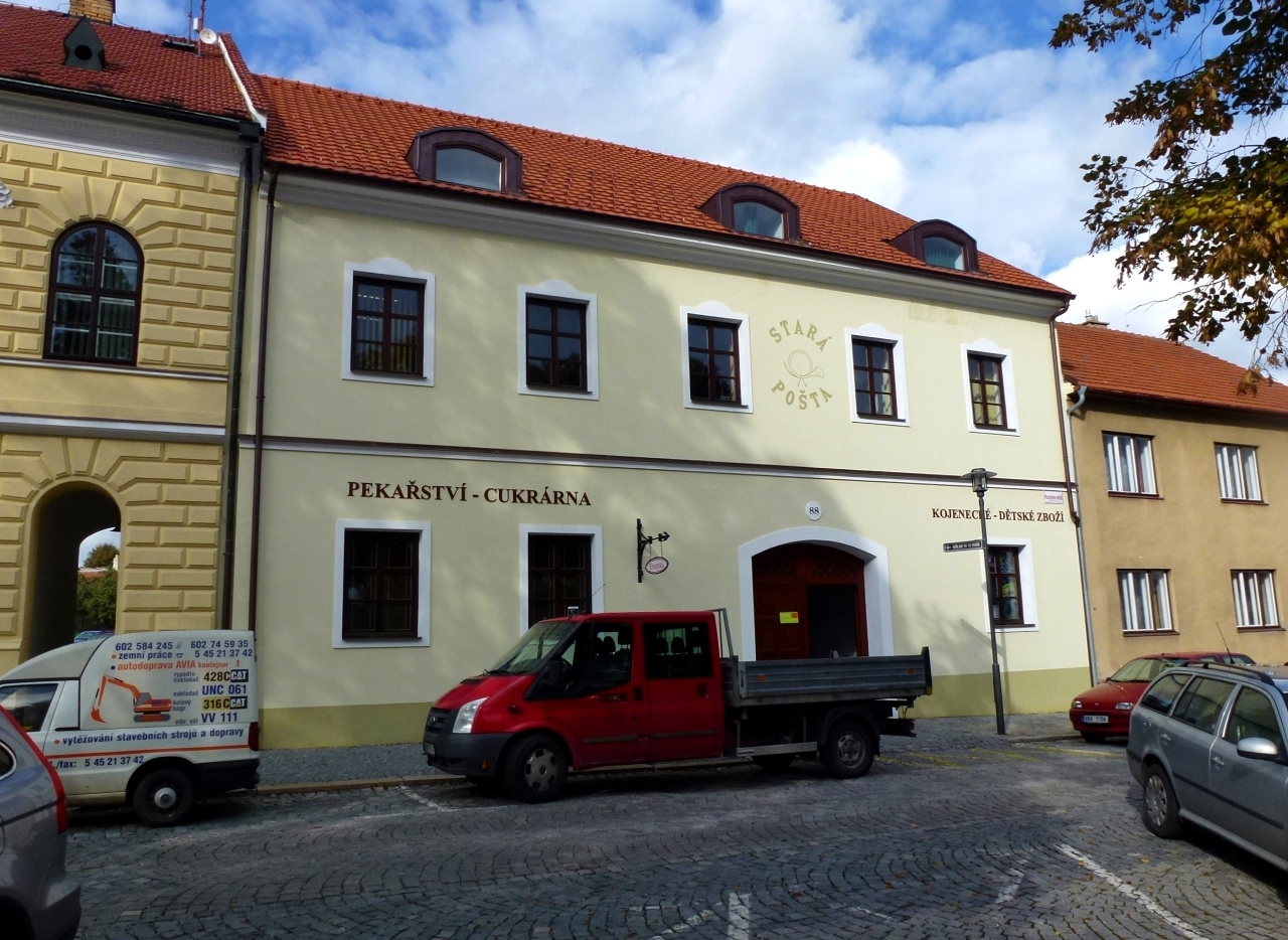 Městský dům - bývalá pošta (Velká Bíteš), Masarykovo náměstí 88, Velká Bíteš